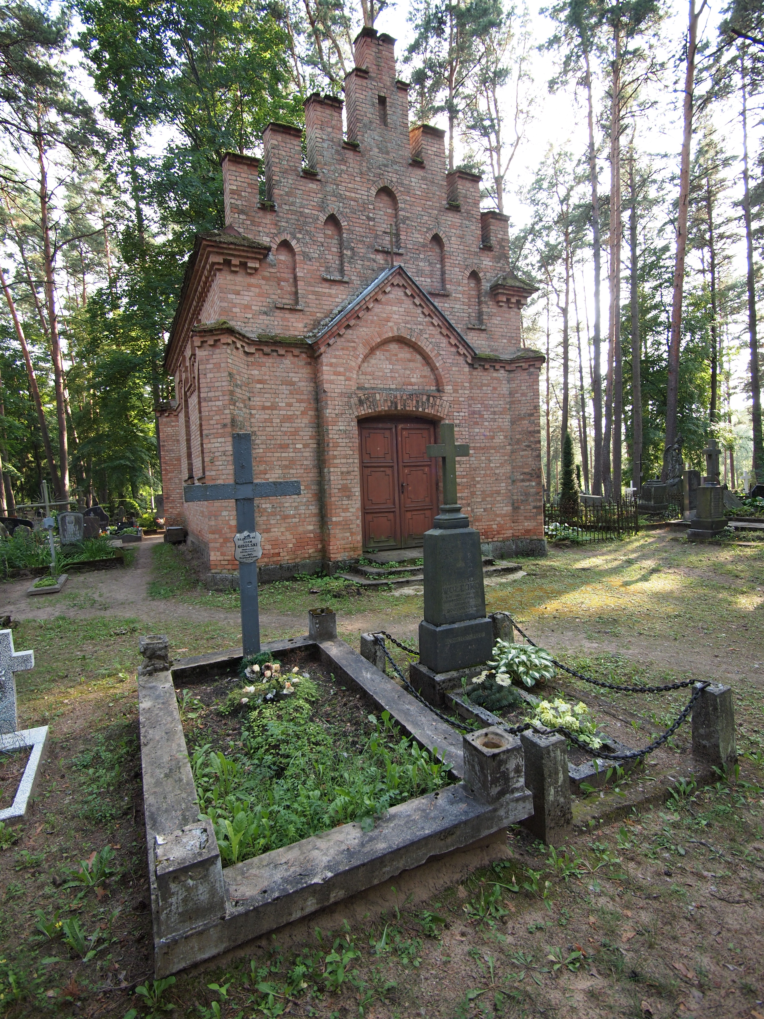 Druskininkai, Lithuania